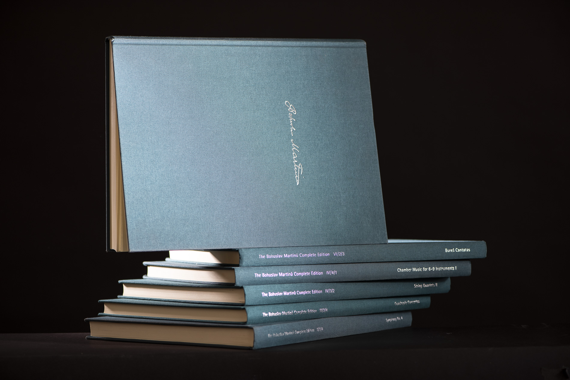 První svazky Souborného vydání děl Bohuslava Martinů (Bohuslav Martinů Complete Edition)